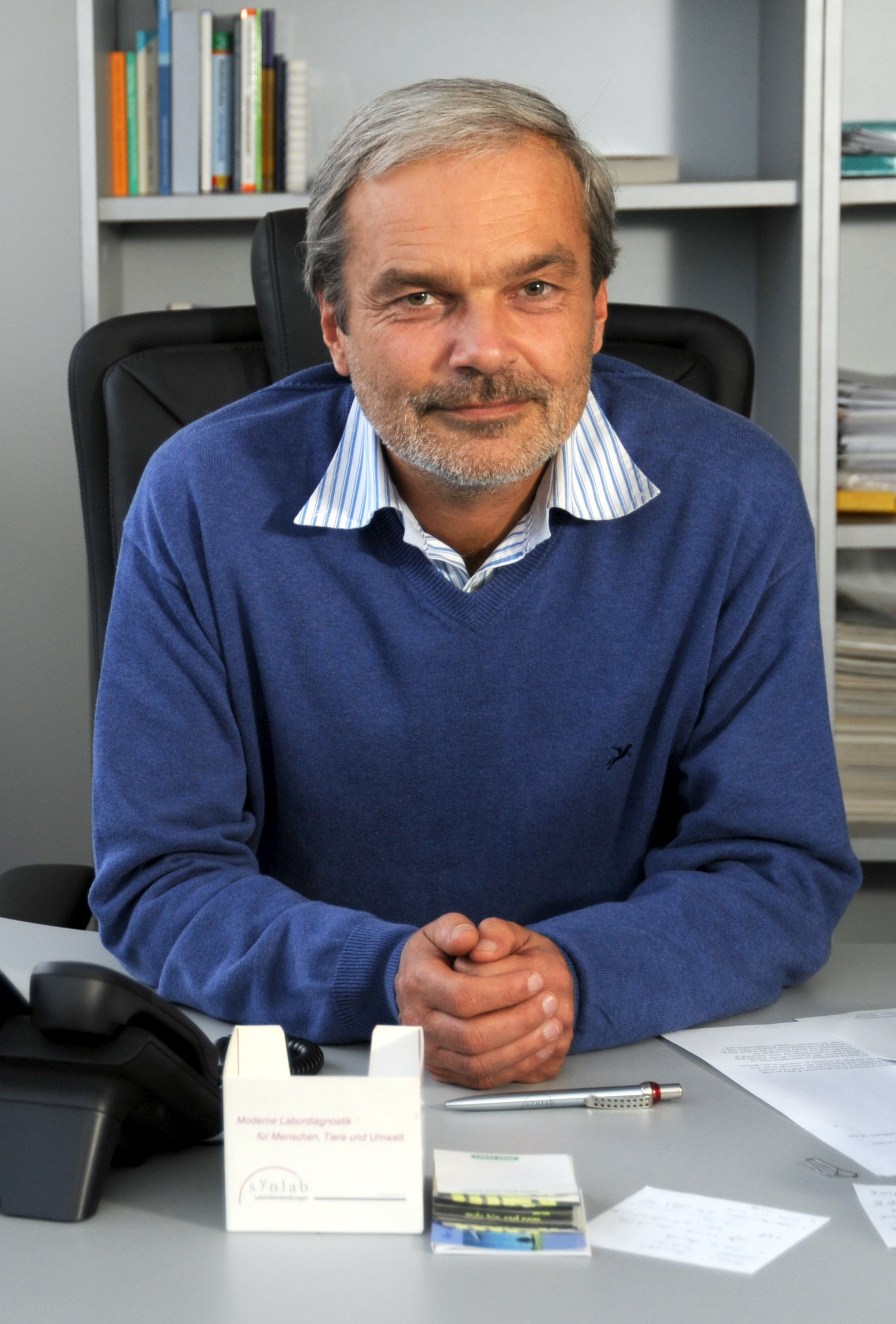 Bild von Bartl Wimmer, dem CEO der synlab-Gruppe.